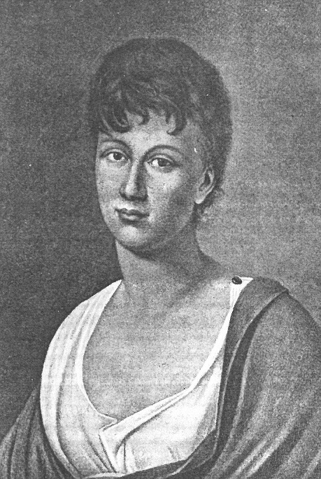 Giulietta Guicciardi (1782–1856)